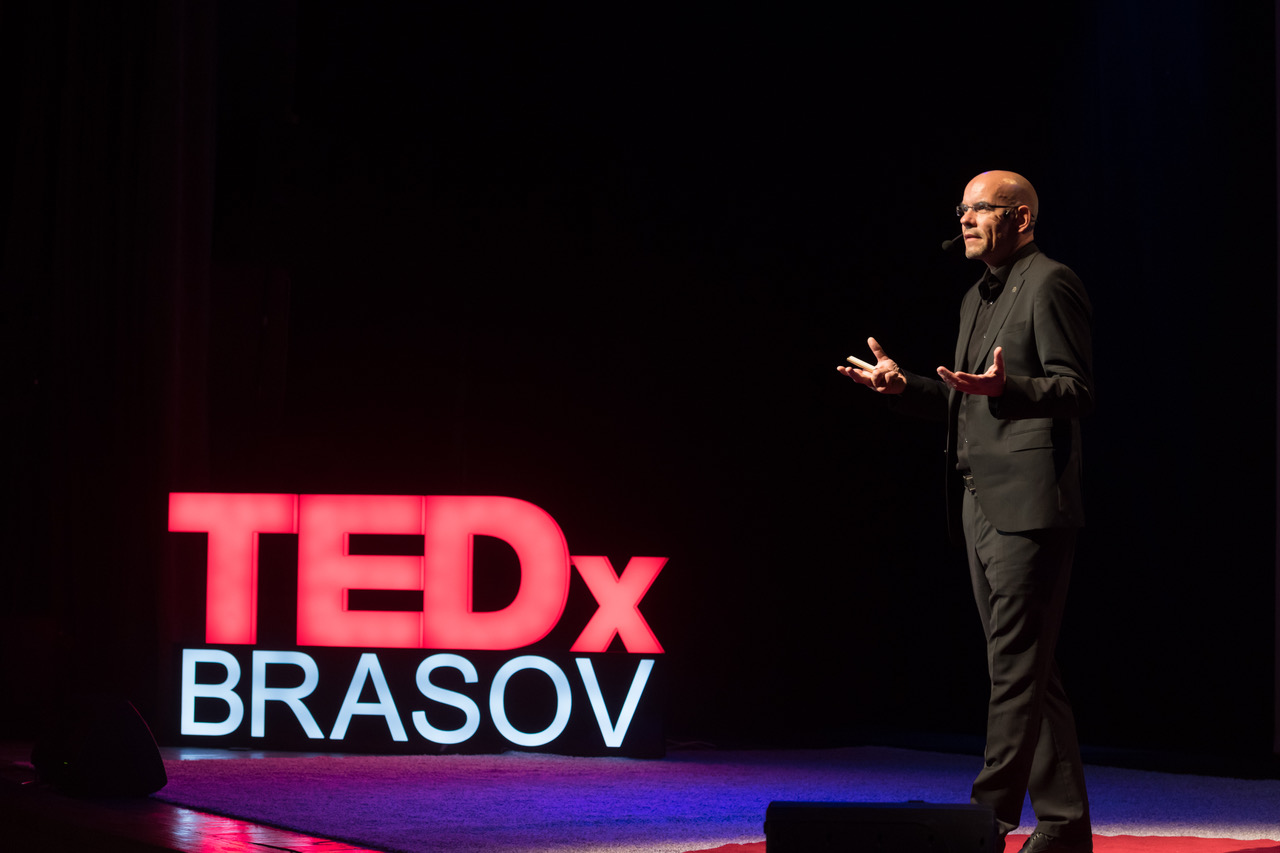 Bernhard Moestl Redner bei TEDx Brasov 2019